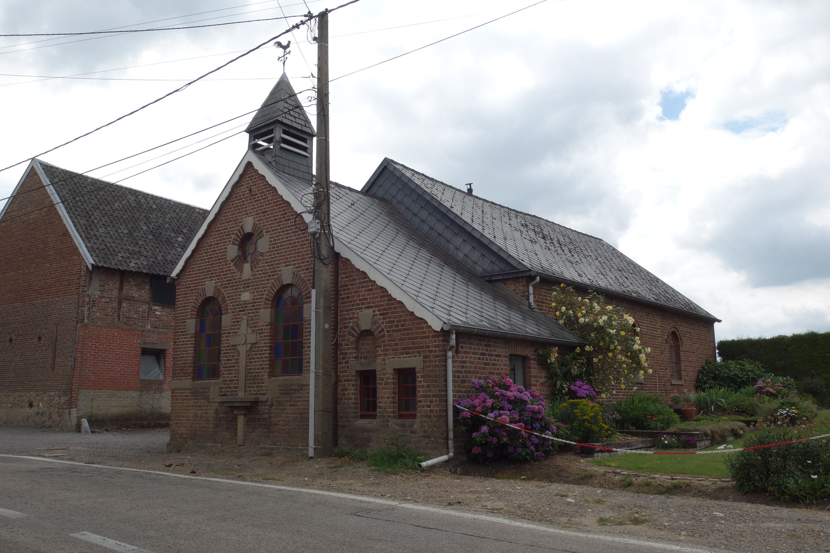 Sint-Rochuskapel op De Plank in Sint-Martens-Voeren, in juli 2020.